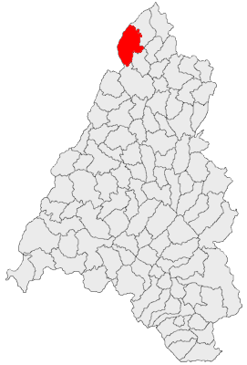 Categorie:Hărţi ale judeţului Bihor